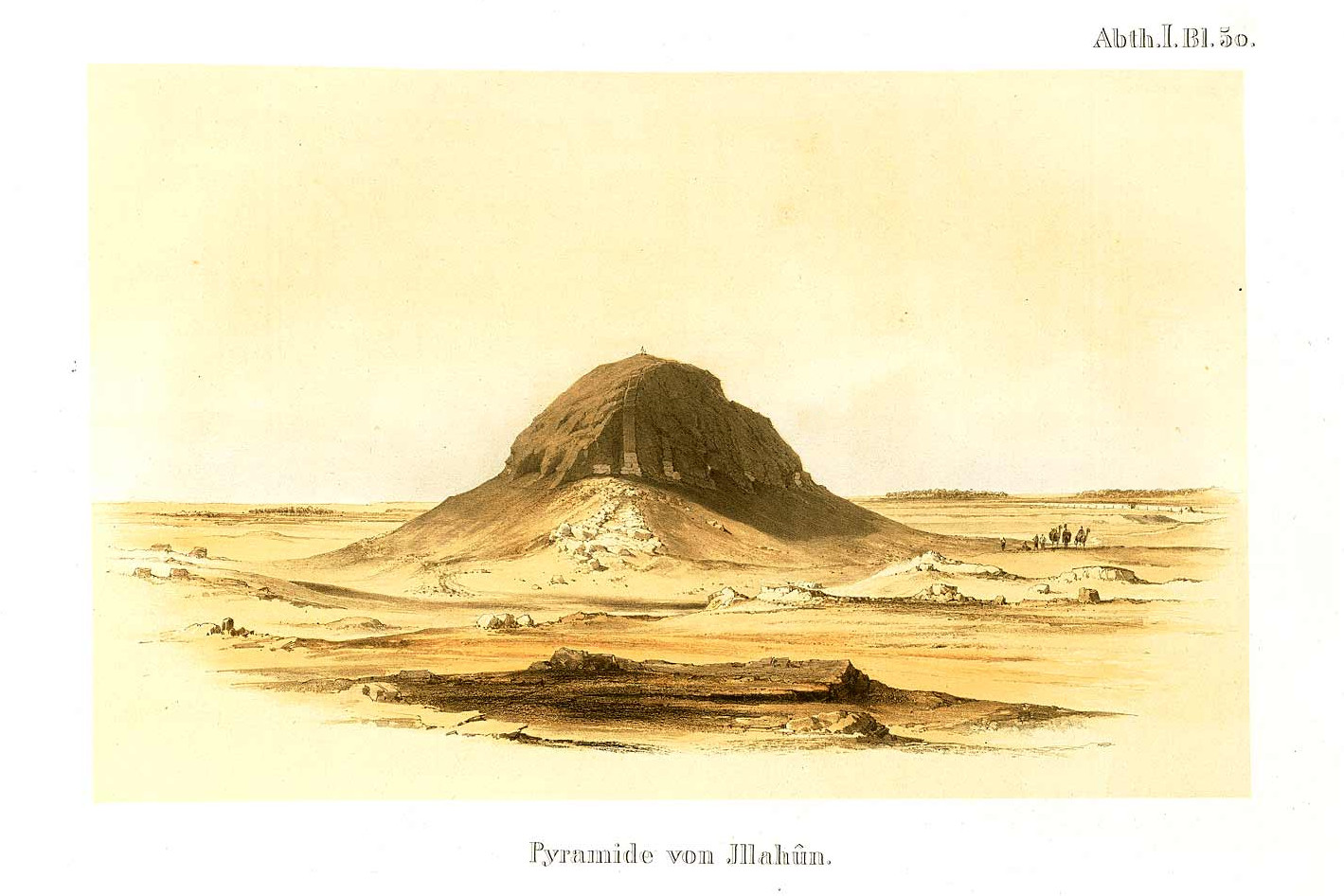 Pyramid of Senusret II Denkmaeler aus Aegypten und Aethiopien nach den Zeichnungen der von Seiner Majestät dem Koenige von Preussen, Friedrich Wilhelm IV., nach diesen Ländern gesendeten, und in den Jahren 1842–1845 ausgeführten wissenschaftlichen Expedition auf Befehl Seiner Majestät מצבות זיכרון ממצרים ואתיופיה על פי הציורים שצוירו בהוראת הוד רוממותו מלך פרוסיה פרידריך הרביעי, בידי משלחות מדעיות בשנים 1842-1845 ששוגרו בפקודת הוד רוממותו